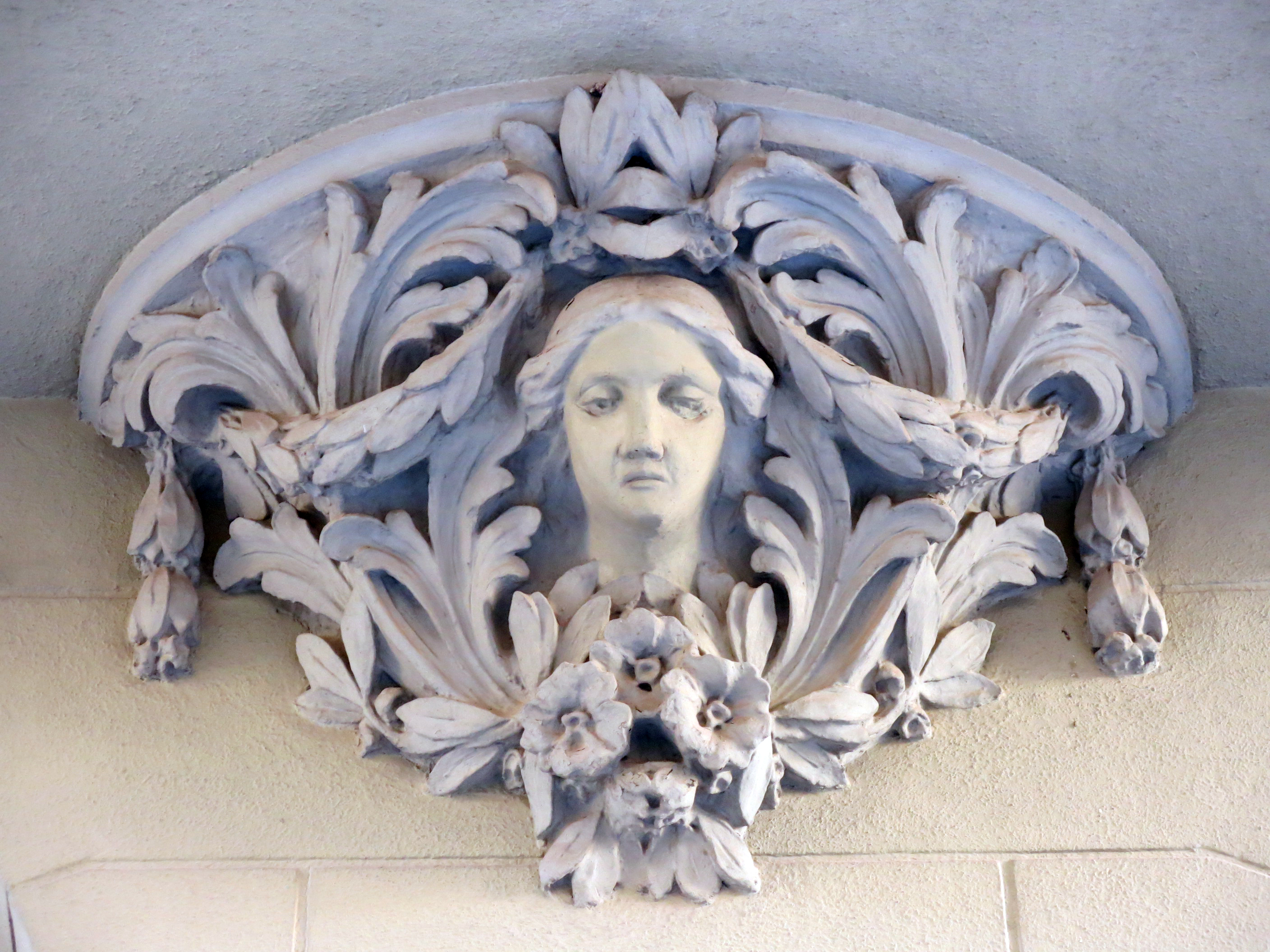 Casa Bernardo Grego (Tortosa)